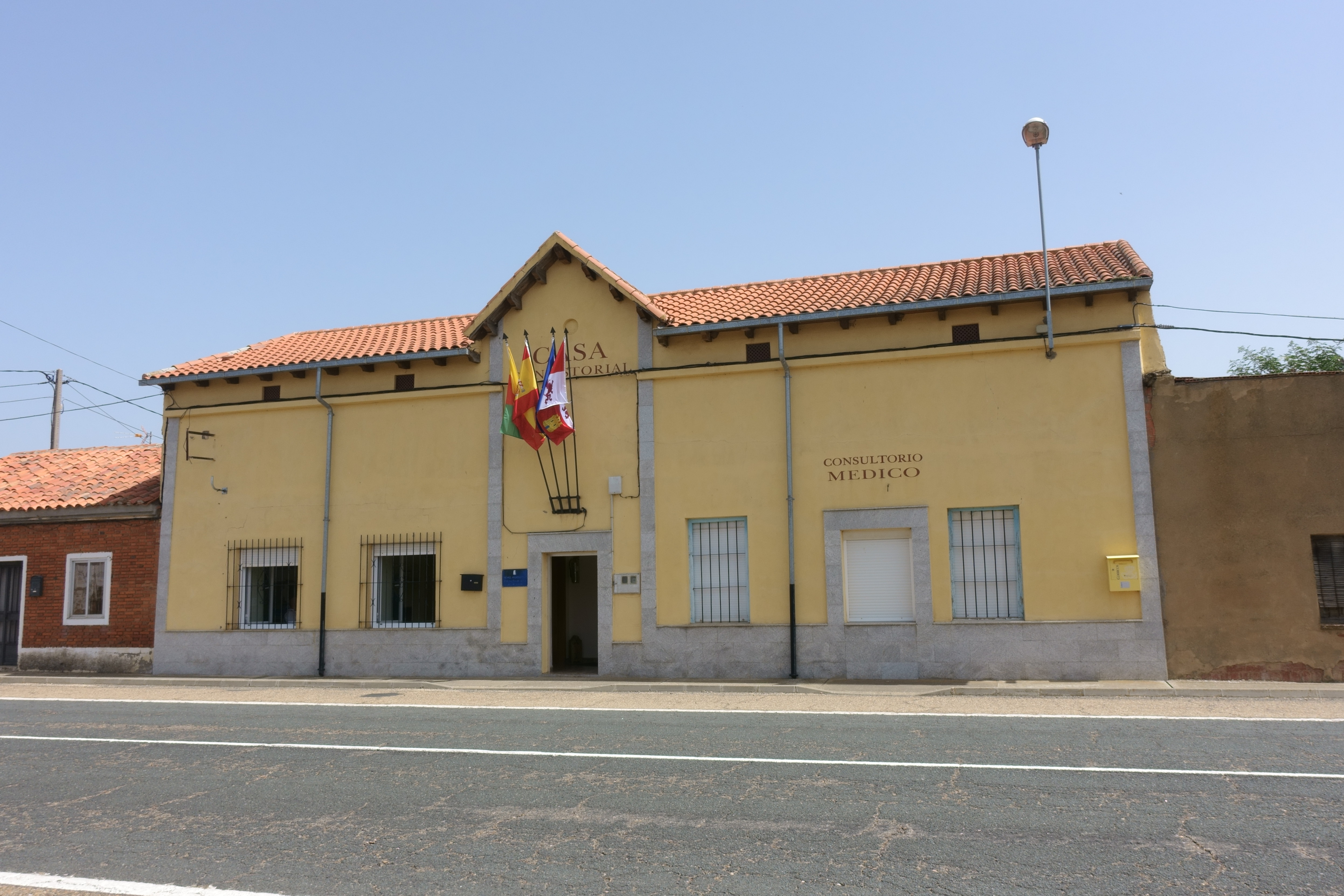 Casa consistorial de Pozuelo del Páramo (León, España).